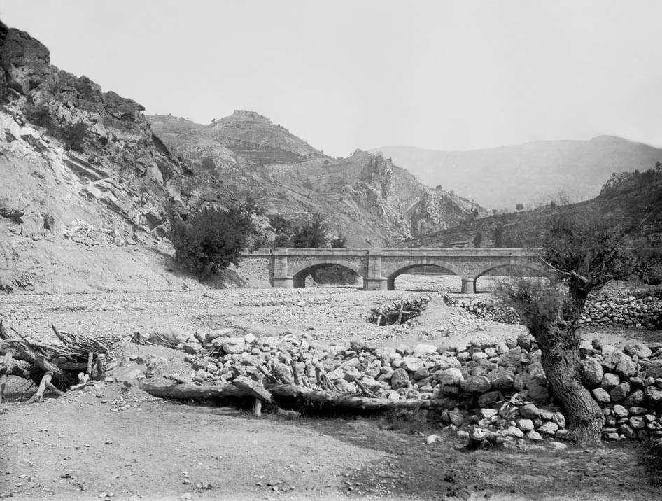 Imatge